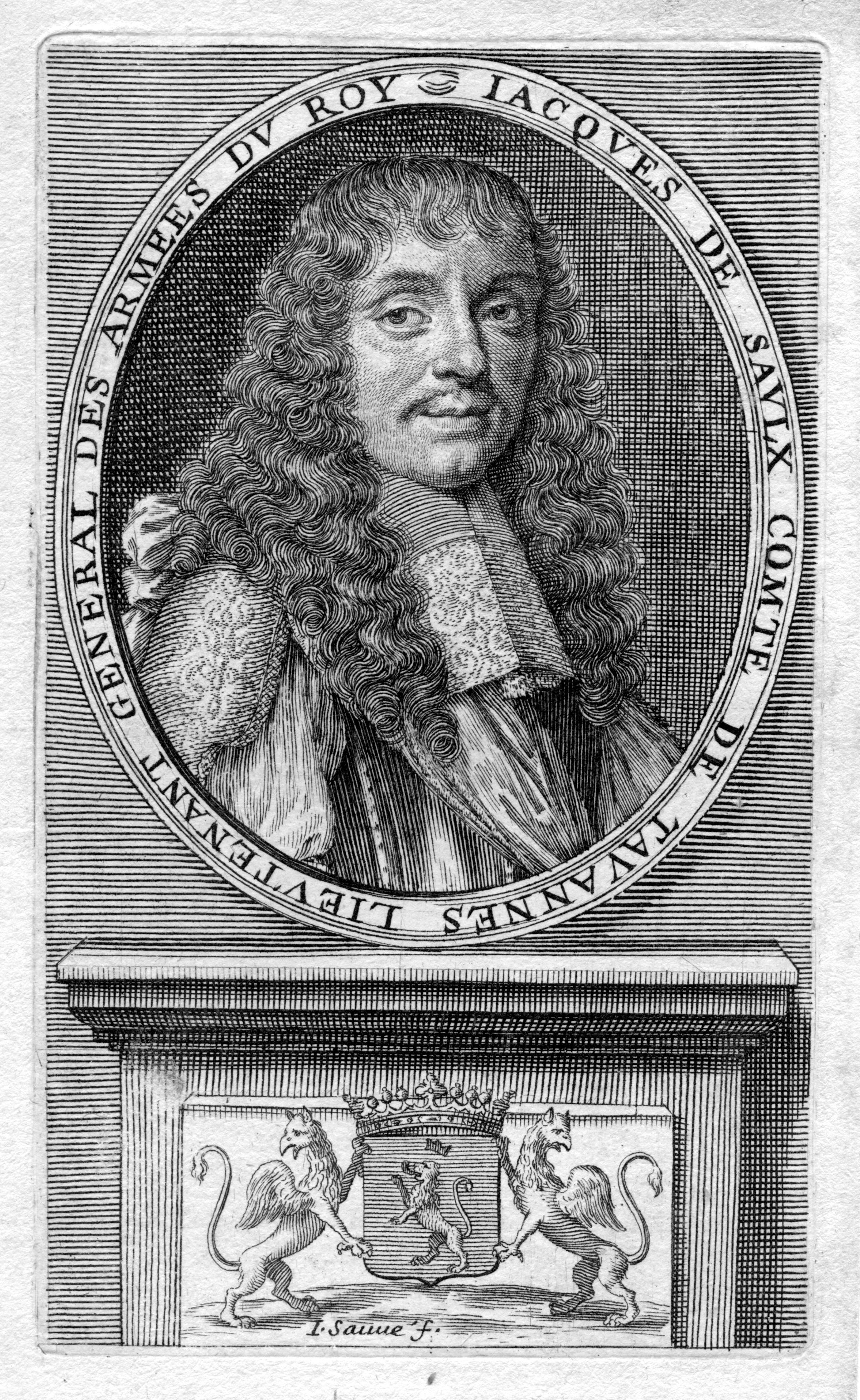 portrait gravé